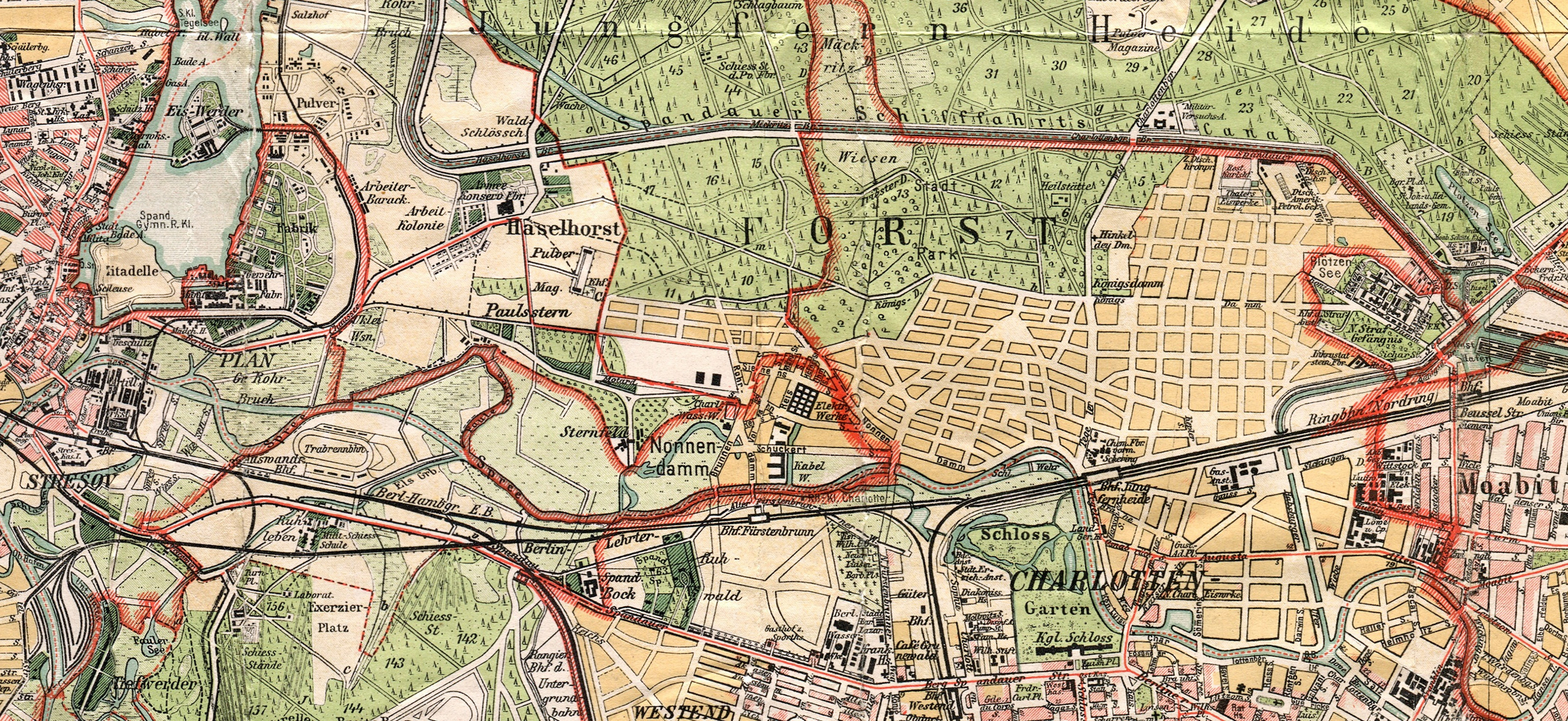 Lage des Nonnendamms um 1909 zwischen Spandau und Charlottenburg/ Tegeler Weg und Berlin-Moabit. Ausschnitt aus der Karte von Straube 1909. spezieller Ausschnitt aus Straube's Spezialkarte der nördlichen Vororte von Berlin Format: 60,8 x 46,9 cm / 59,1 x 43,0 (n.d. Plan) Orientierung: Nord Maßstab: 1: 36 000 Farblithografie Im Vergleich zu den Vorgängerplänen fehlt hier der Titel und die Herkunftsangaben unterhalb des Plans. Rechts oben ist jetzt die Schutzmarke von Straube eingefügt. Im Rahmen Längen- und Breitengrad (nach Ferro). Der Plan reicht östlich von Spandau bis westlich nach Weißensee, sowie südlich von Charlottenburg bis nördlich nach Schönfließ.